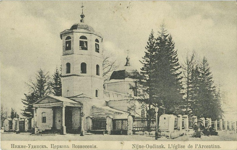 Вознесенская церковь в Нижнеудинске (1811-35)